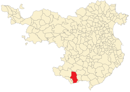 Situación de Sant Feliu de Buixalleu en la provincia de Gerona.